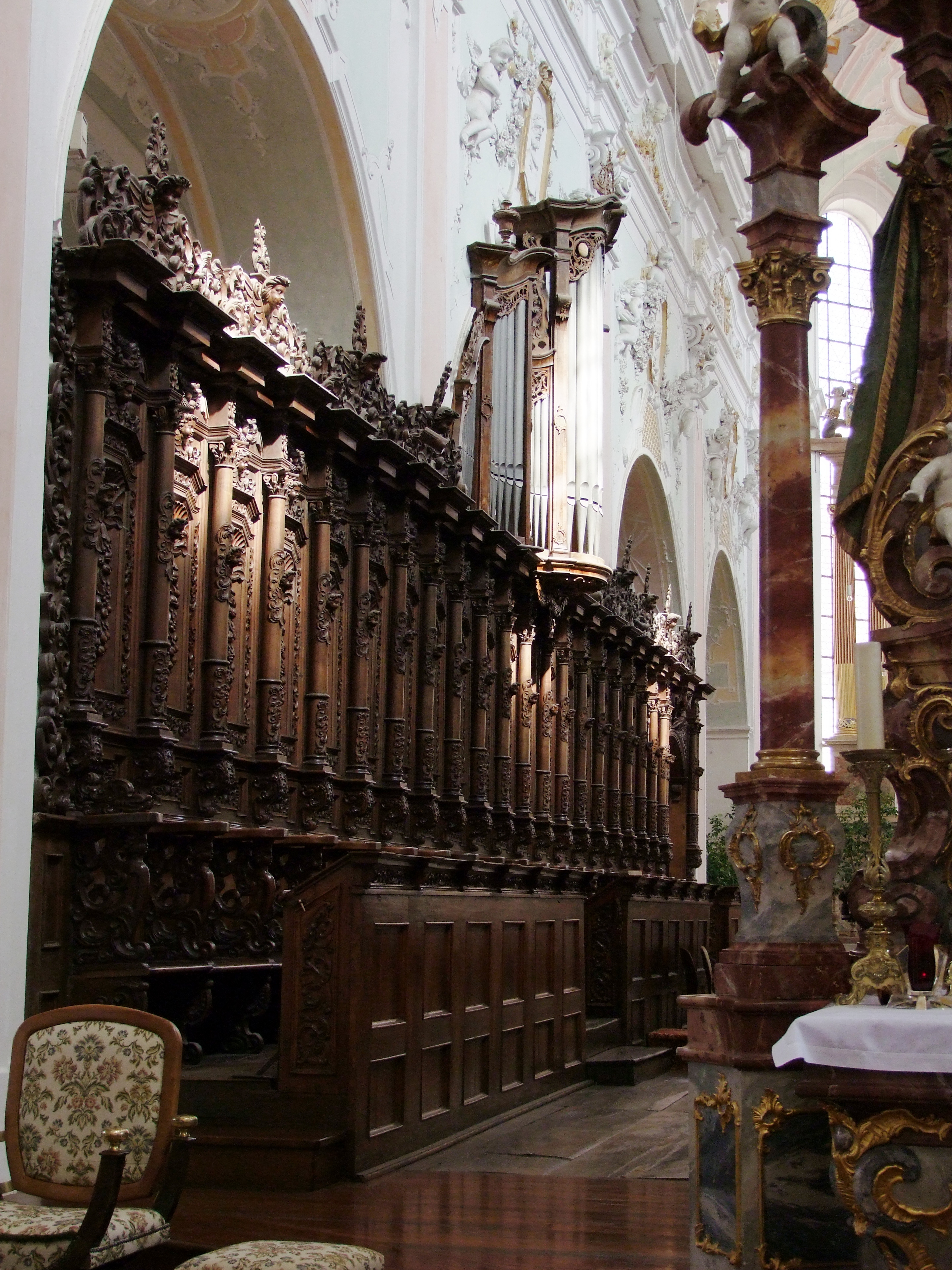 St. Georg, ehemalige Klosterkirche des oberschwäbischen Klosters Ochsenhausen. Knorpelwerk-Blattmasken befinden sich auf den unteren Trommeln der Säulen und auf den Konsolen.